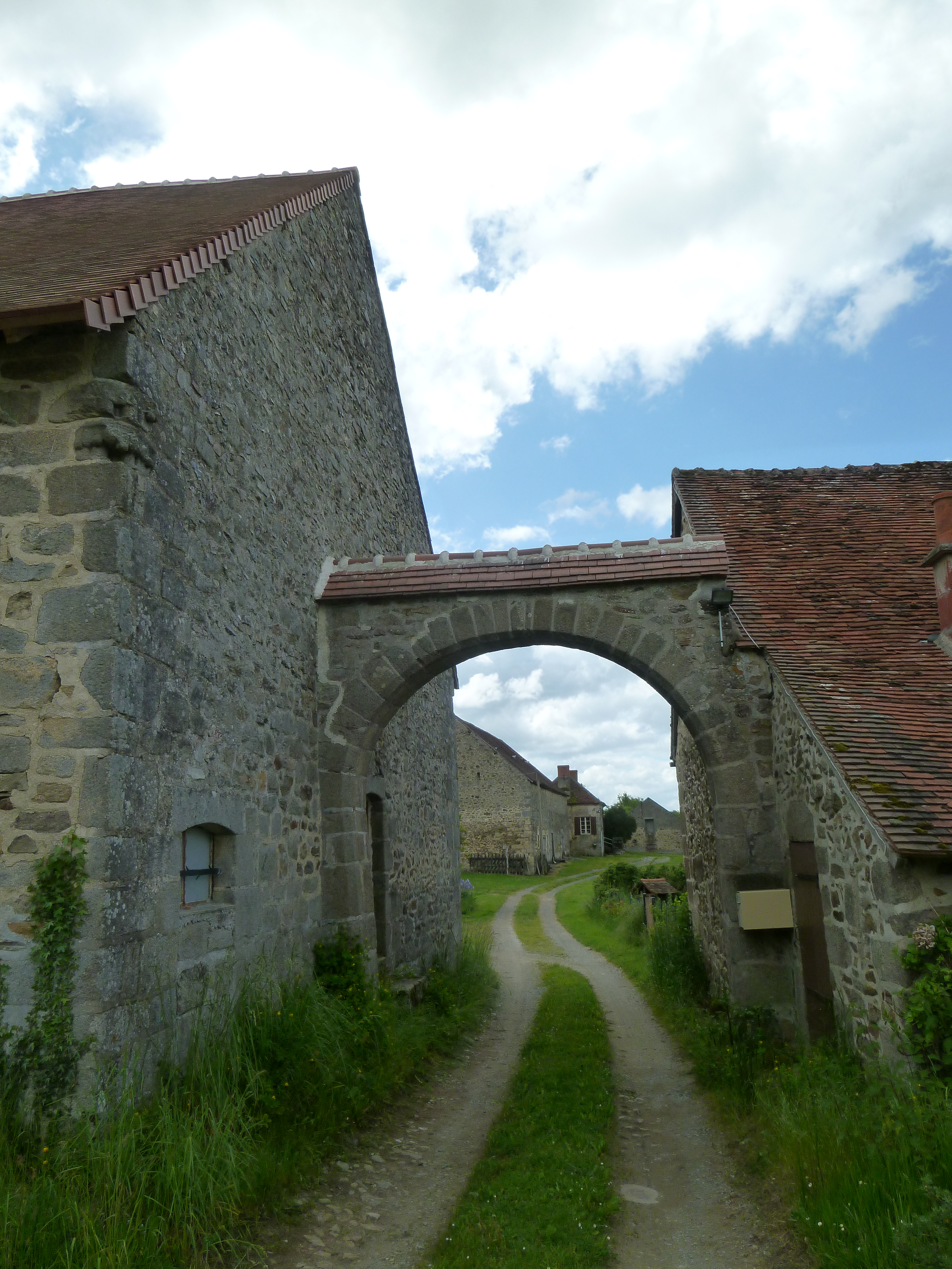 Porche d'entrée probablement plus récent.